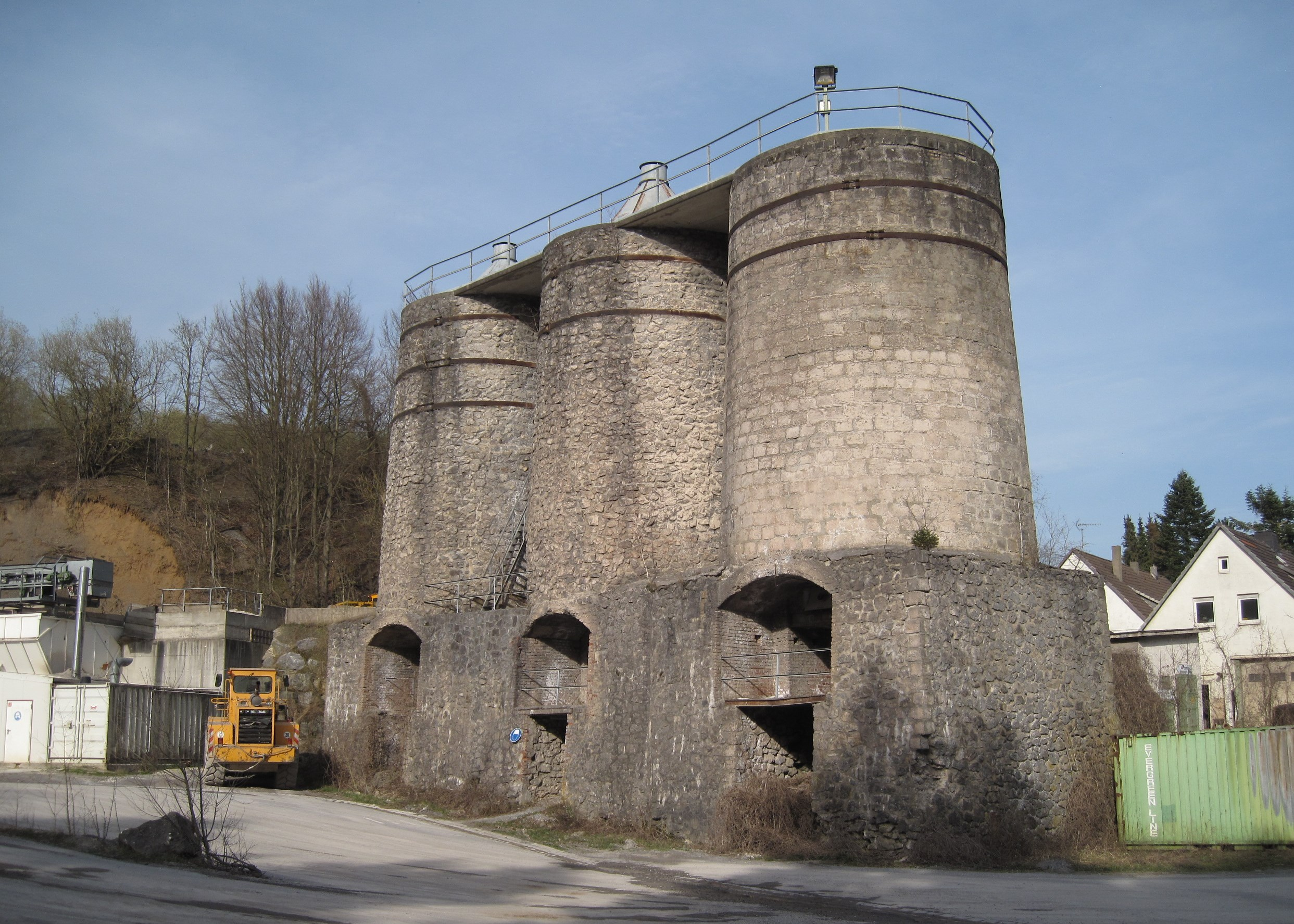 Als Industriedenkmal unter Schutz stehende „Kalköfen Horst“ in Balve-Eisborn. 1962 stillgelegt. Erbaut 1929/1930; Zweiergruppe (Bruchsteinmauerwerk) 1929, dritter Ofen (Zementbeton-Formstein) ein Jahr später.